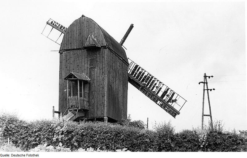 Original image description from the Deutsche Fotothek Oschersleben-Kleinalsleben. Bockmühle, Baujahr 1830 (um 2001 eingestürzt)